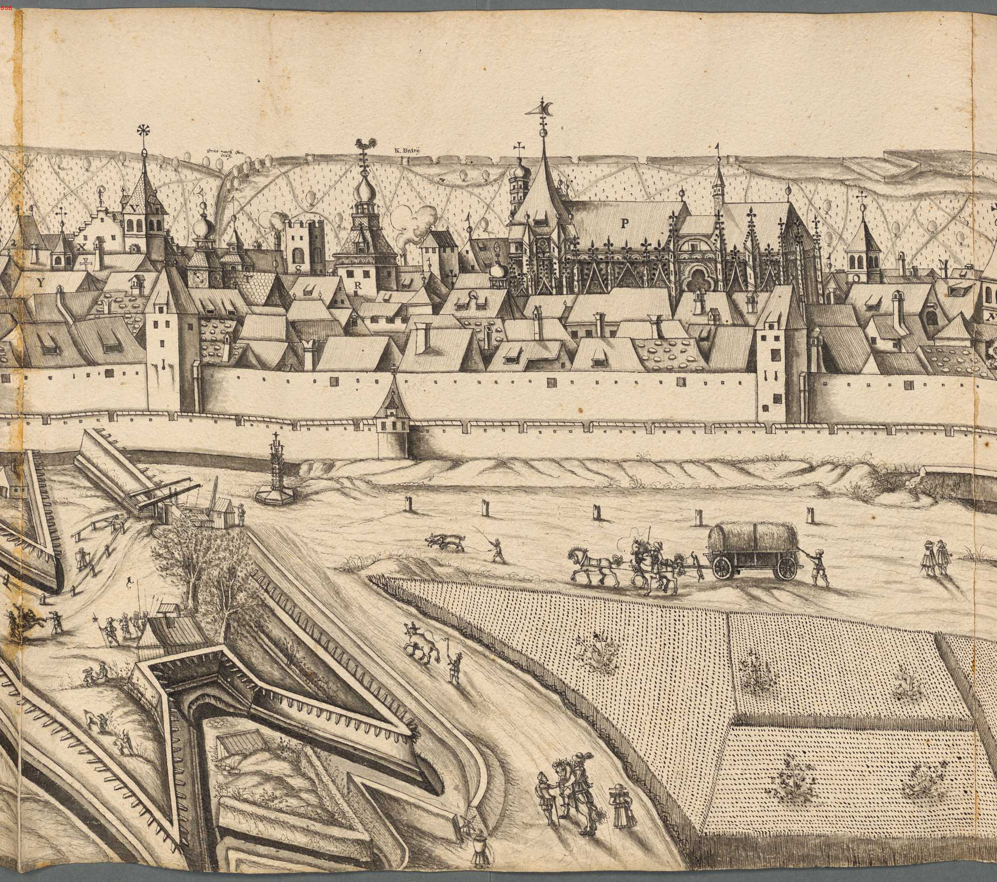 Ansicht der zerschossenen Stadt Regensburg. Markt-Turm, Rathsturm, Neue Pfarr, Dom-Stift